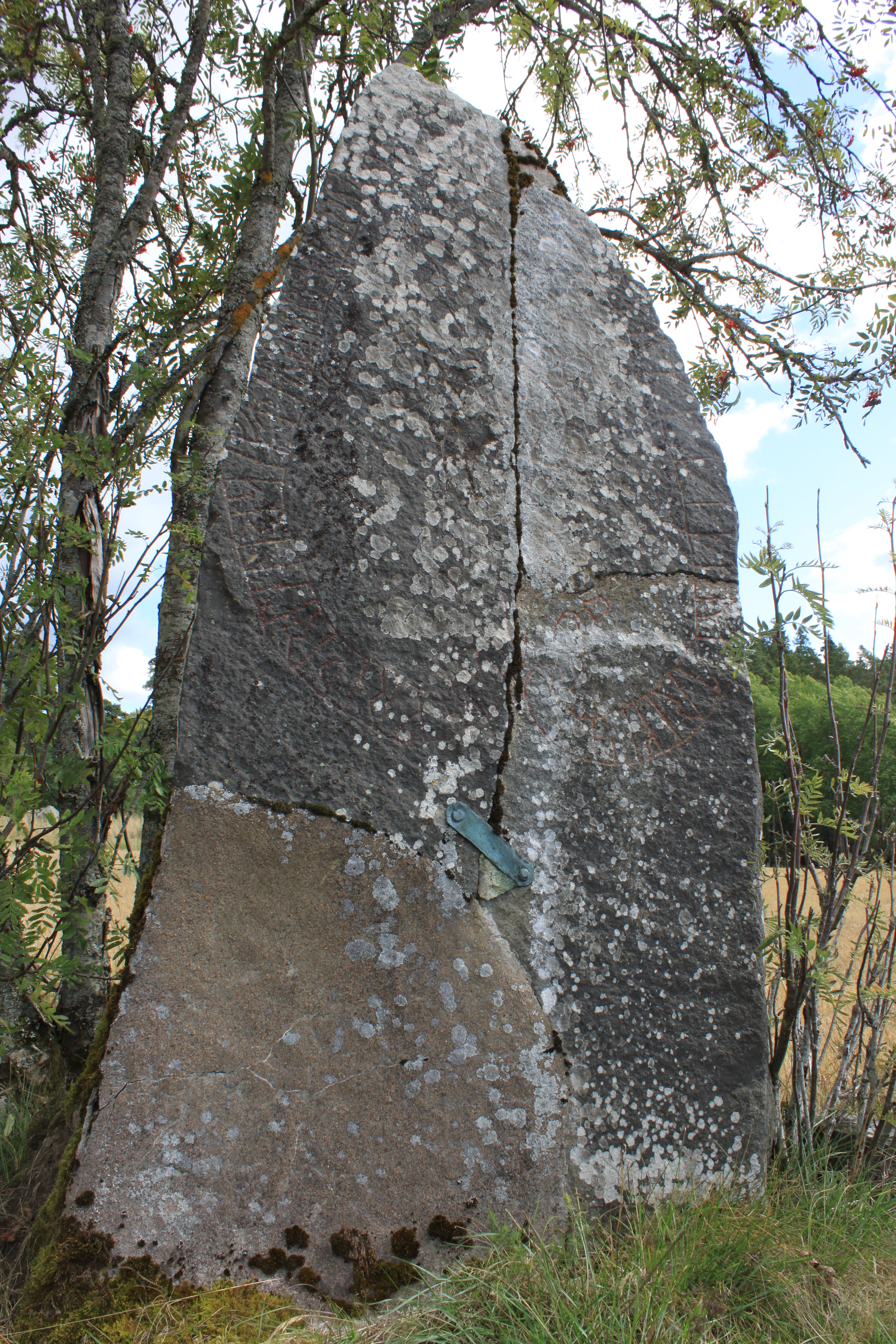 Runristning. Glanshammar 57:1.